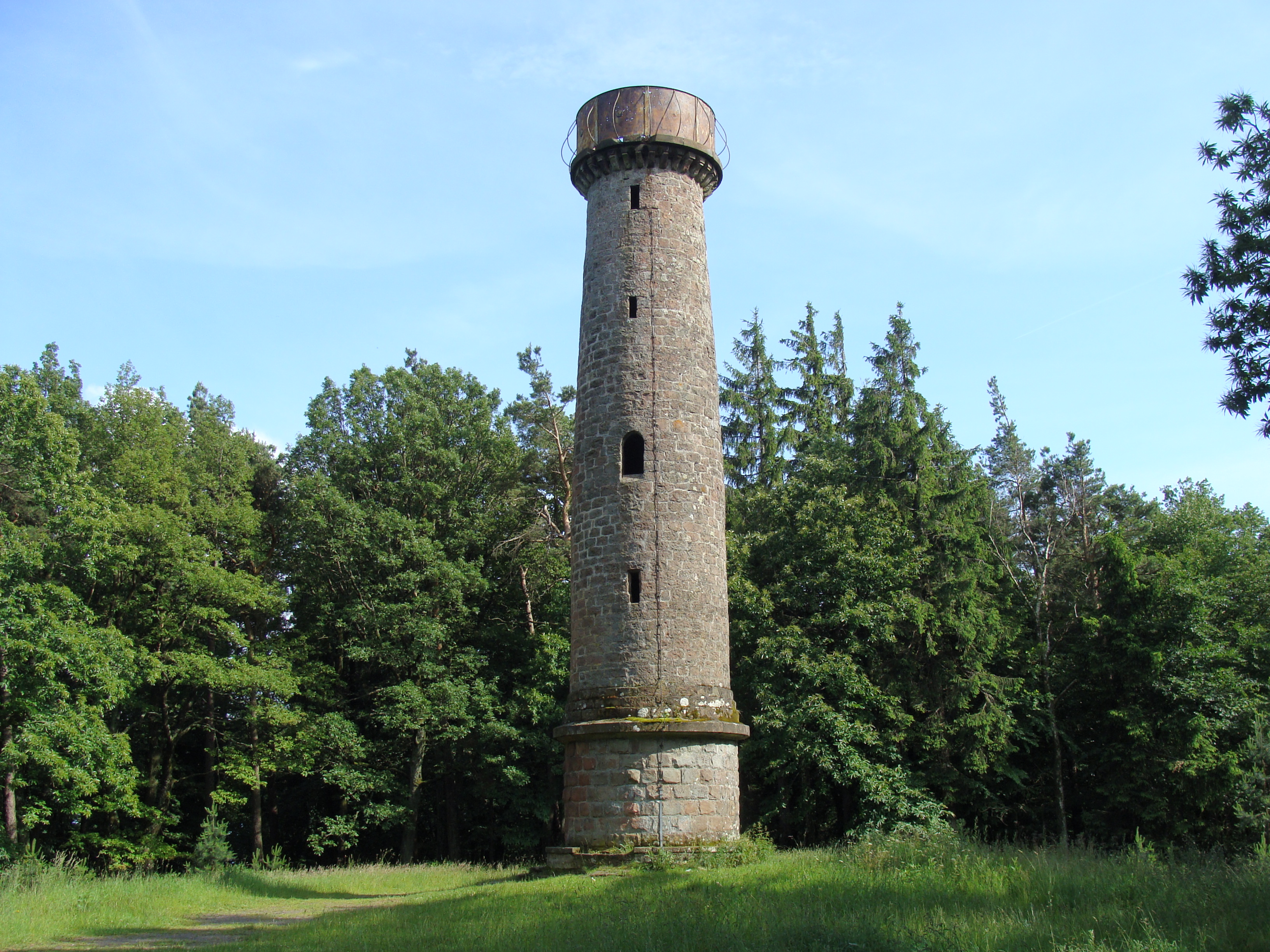 Ludwigsturm am Blättersberg im Pfälzerwald